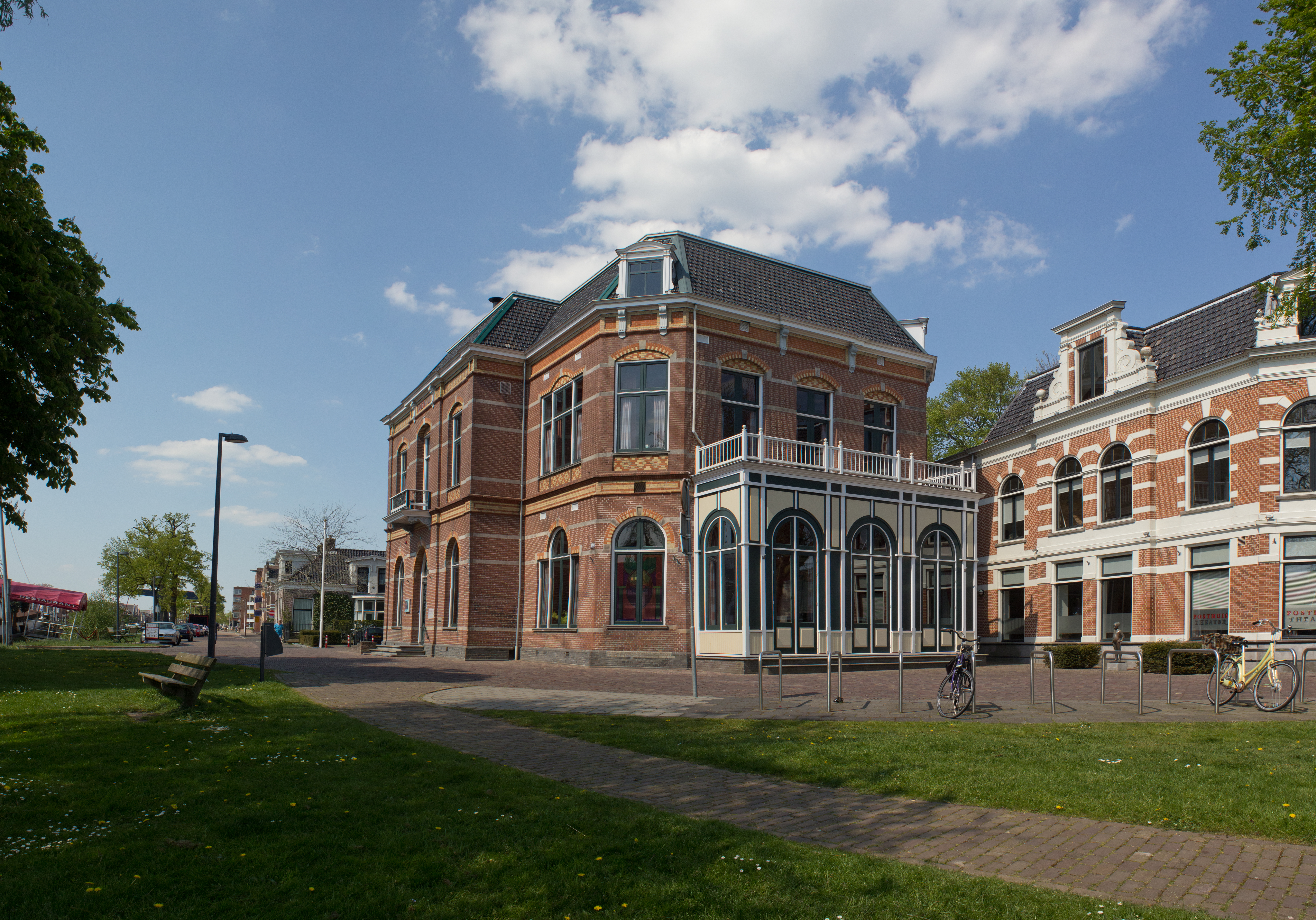 Het Posthuistheater te Heerenveen.